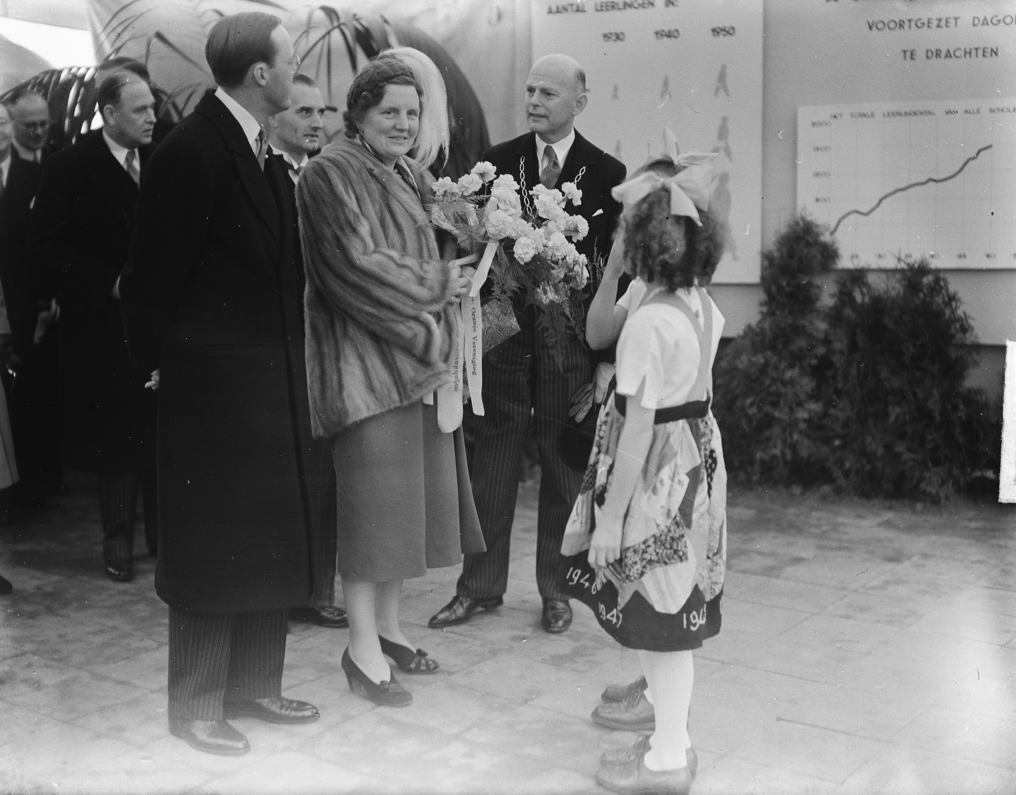 Collectie / Archief : Fotocollectie Anefo Reportage / Serie : [ onbekend ] Beschrijving : Serie: Bezoek van koningin Juliana en prins Bernhard aan Friesland Datum : 26 september 1950 Locatie : Friesland Trefwoorden : bezoeken, koninklijk huis Persoonsnaam : Bernhard, prins, Juliana, koningin Fotograaf : Noske, J.D. / Anefo Auteursrechthebbende : Nationaal Archief Materiaalsoort : Glasnegatief Nummer archiefinventaris : bekijk toegang 2.24.01.09 Bestanddeelnummer : 904-2128